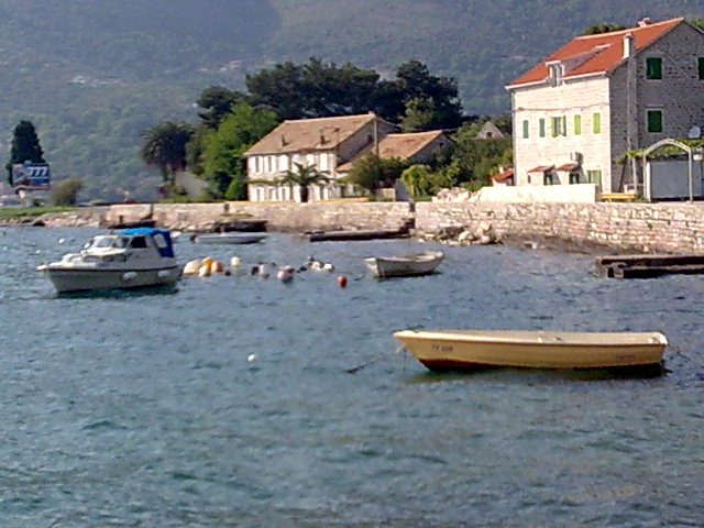 E65, Jošice, Montenegro